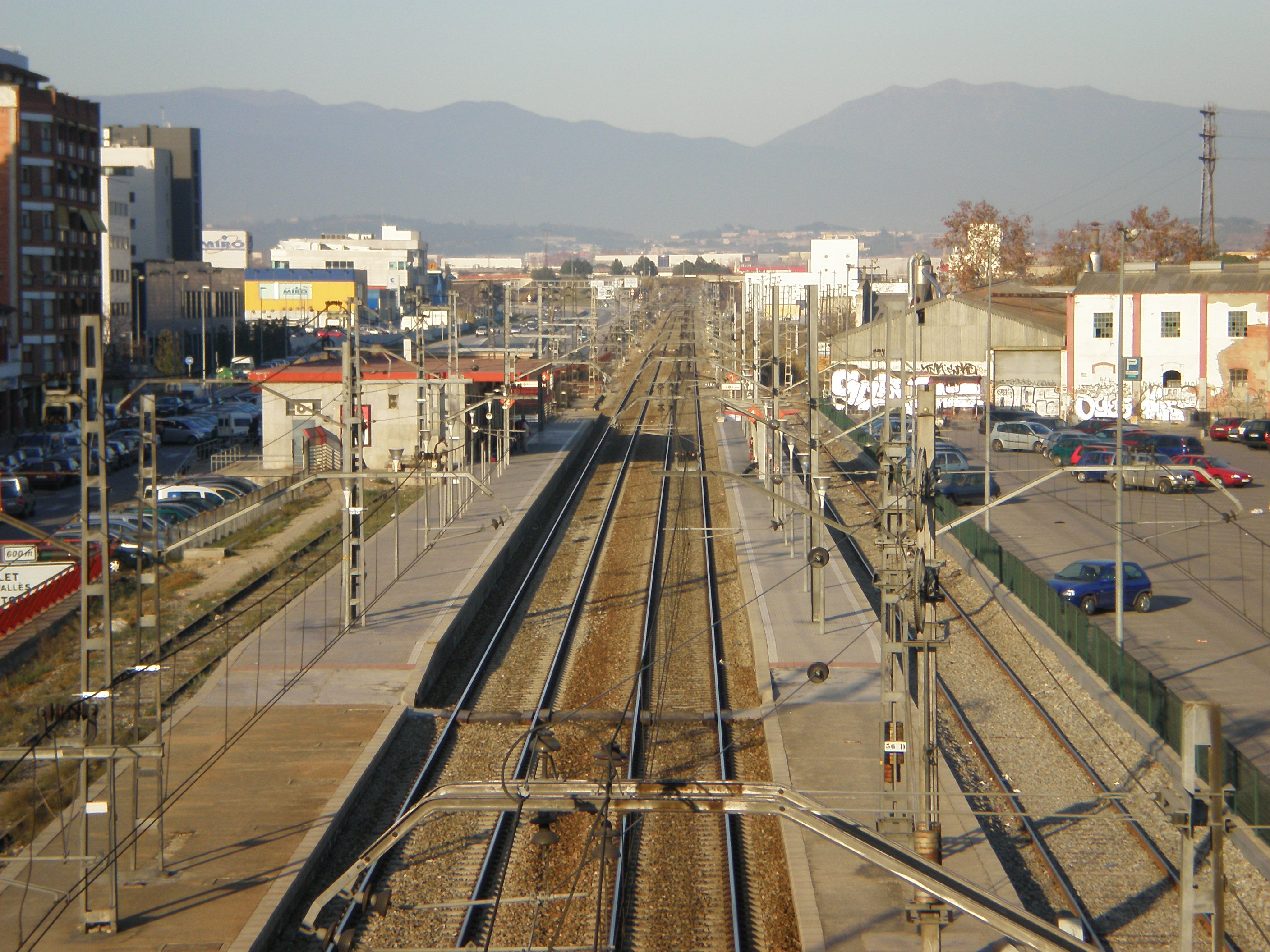 Estación de Mollet - St. Fost en la línea Barcelona - Granollers - Cerbère.